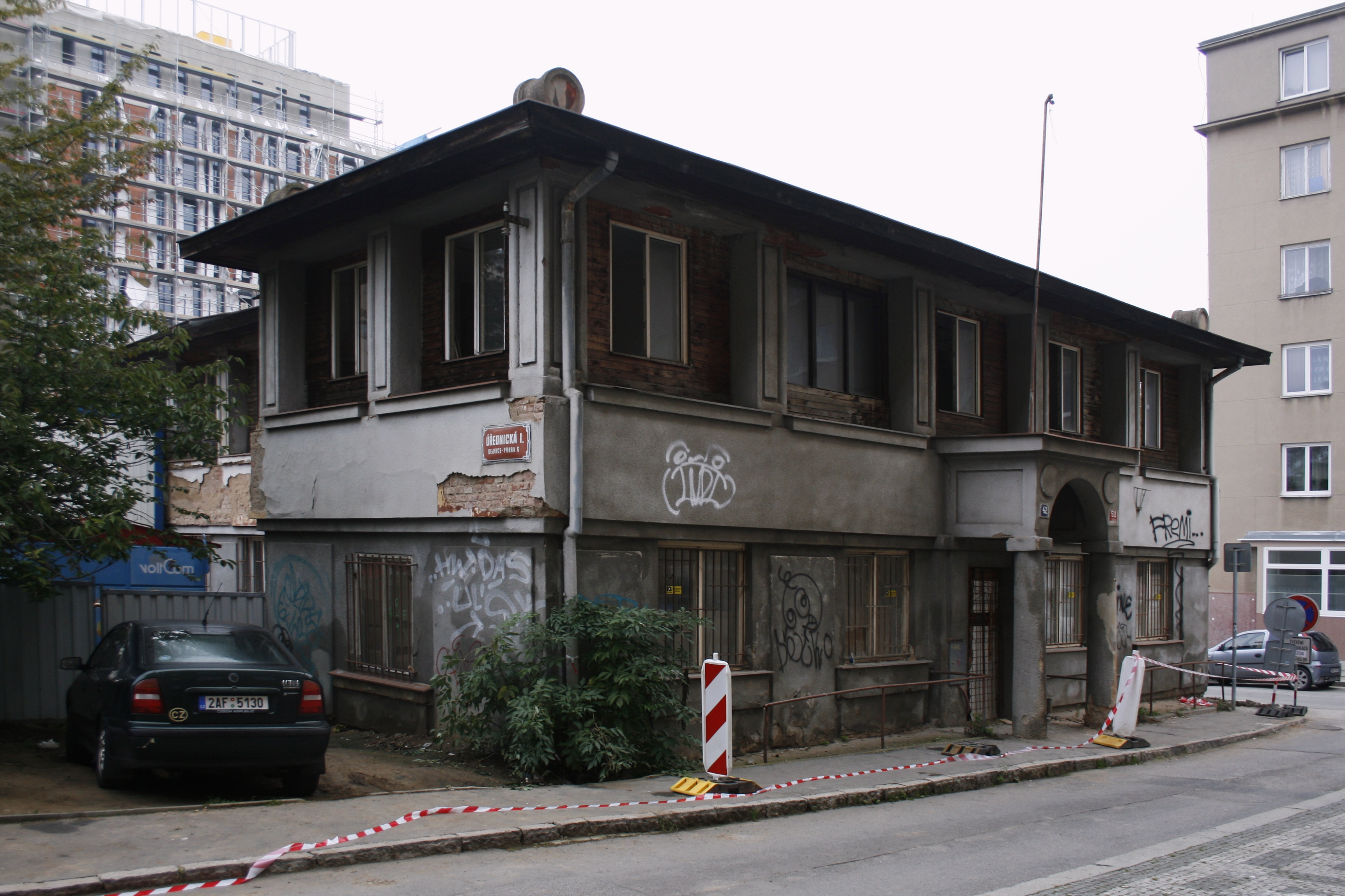 Poslední dům bývalé úřednické kolonie v pražských Dejvicích